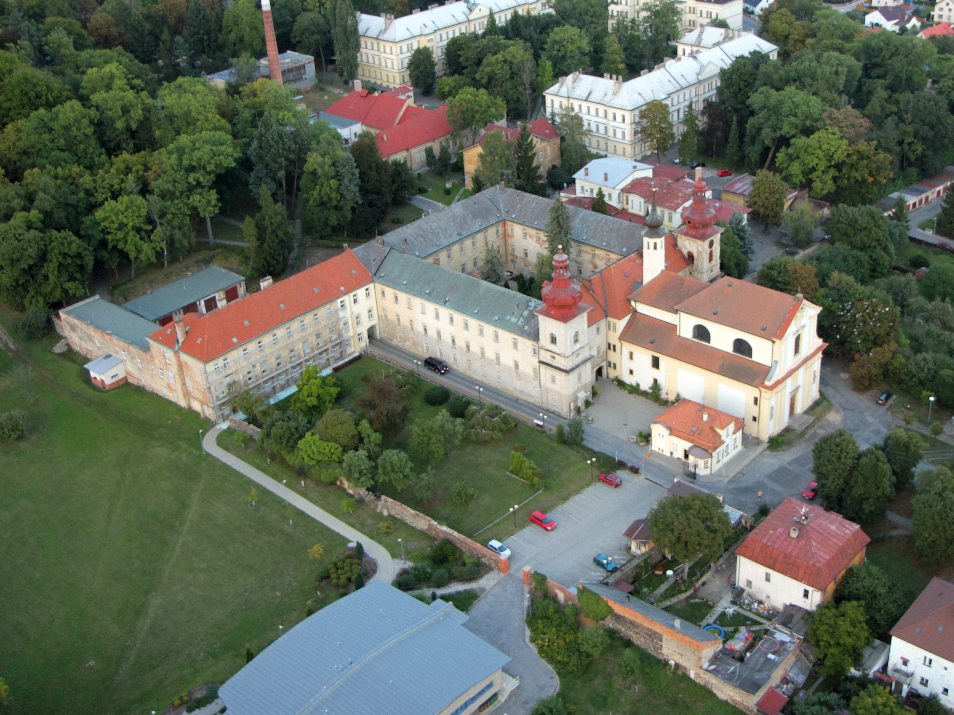 Klášter piaristický (Kosmonosy), Lípy 15, Kosmonosy